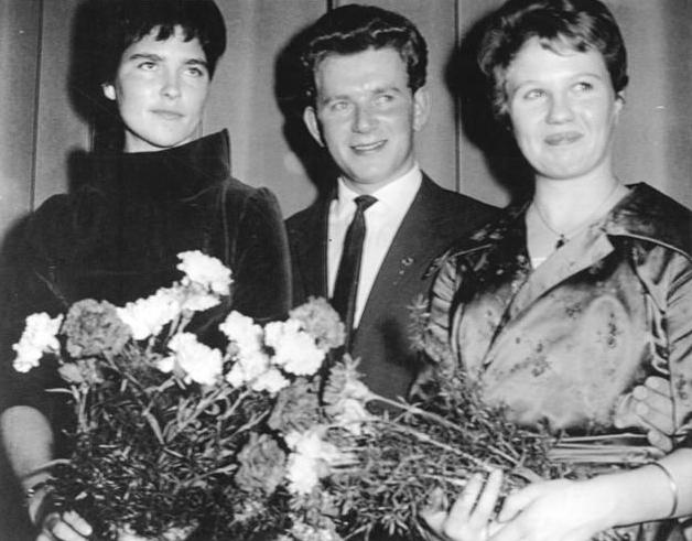 Zentralbild-Telefoto Sd-Qu 19.12.1960 Ehrung für Ingrid Krämer. Siegerin einer Journalistenumfrage der Internationalen Sportkorrespondenz in Stuttgart nach den besten deutschen Sportlerinnen und Sportlern des Jahres 1960 wurde die zweifache Goldmedaillengewinnerin von Rom im Kunst- und Turmspringen, die DDR Sportlerin Ingrid Krämer von der westdeutschen Fecht-Olympiasiegerin Heide Schmid (links). Sportler des Jahres wurde Olympiasiegerin in der Nordischen Kombination Georg Thoma (Westdeutschland)